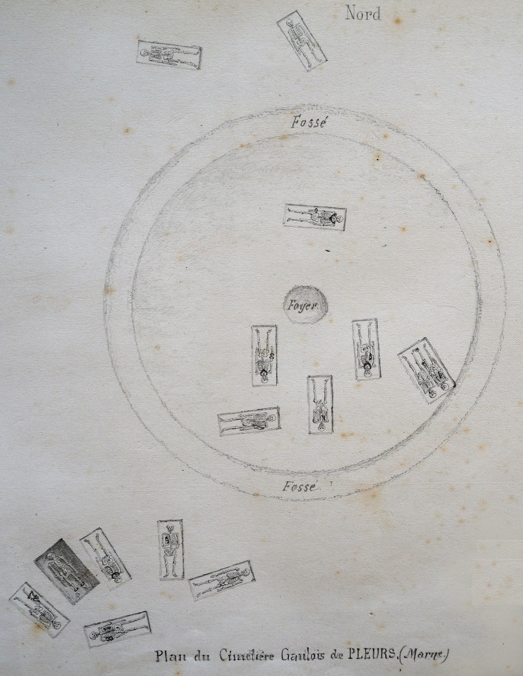 retour sur le fouilles de Morel par des dessins de Gastebois. Fossé d'un mètre de profondeur pour un mètre de large, pour douze mètres de diamètre. Le foyer contenait des cendres de crémation avec de la terre noire.